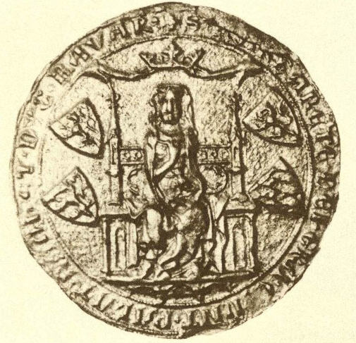 This is a scan of the historical document: Title: Die Siegel der deutschen Kaiser und Könige v. 1 (751 - 1347)